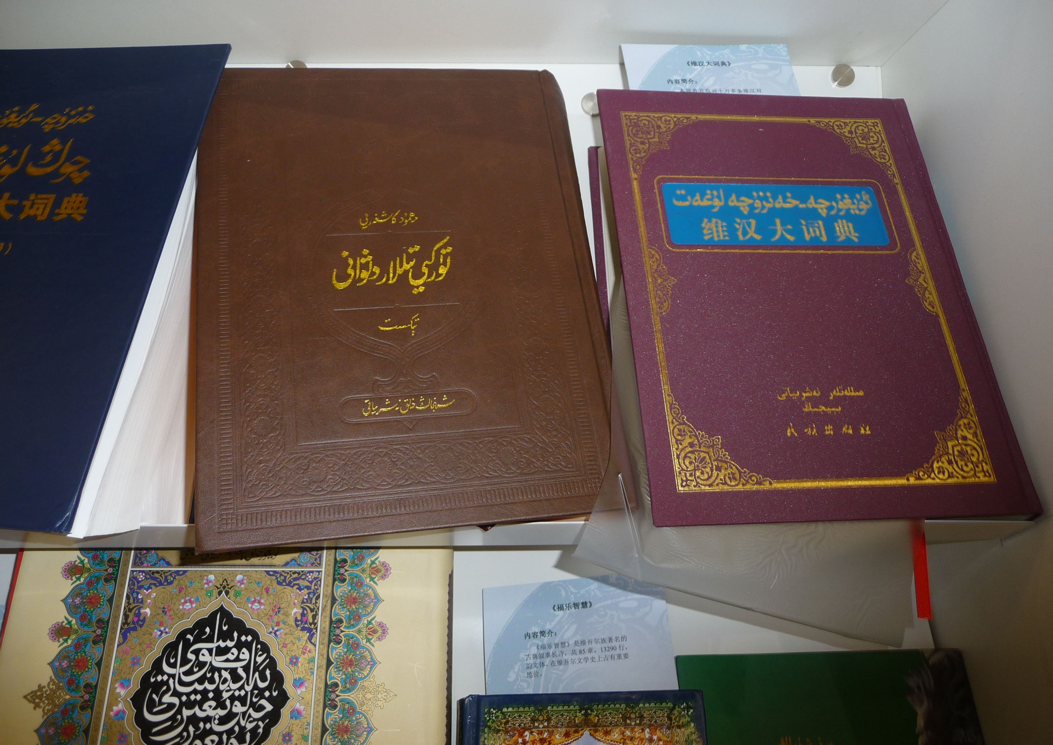 Frankfurter Buchmesse 2009